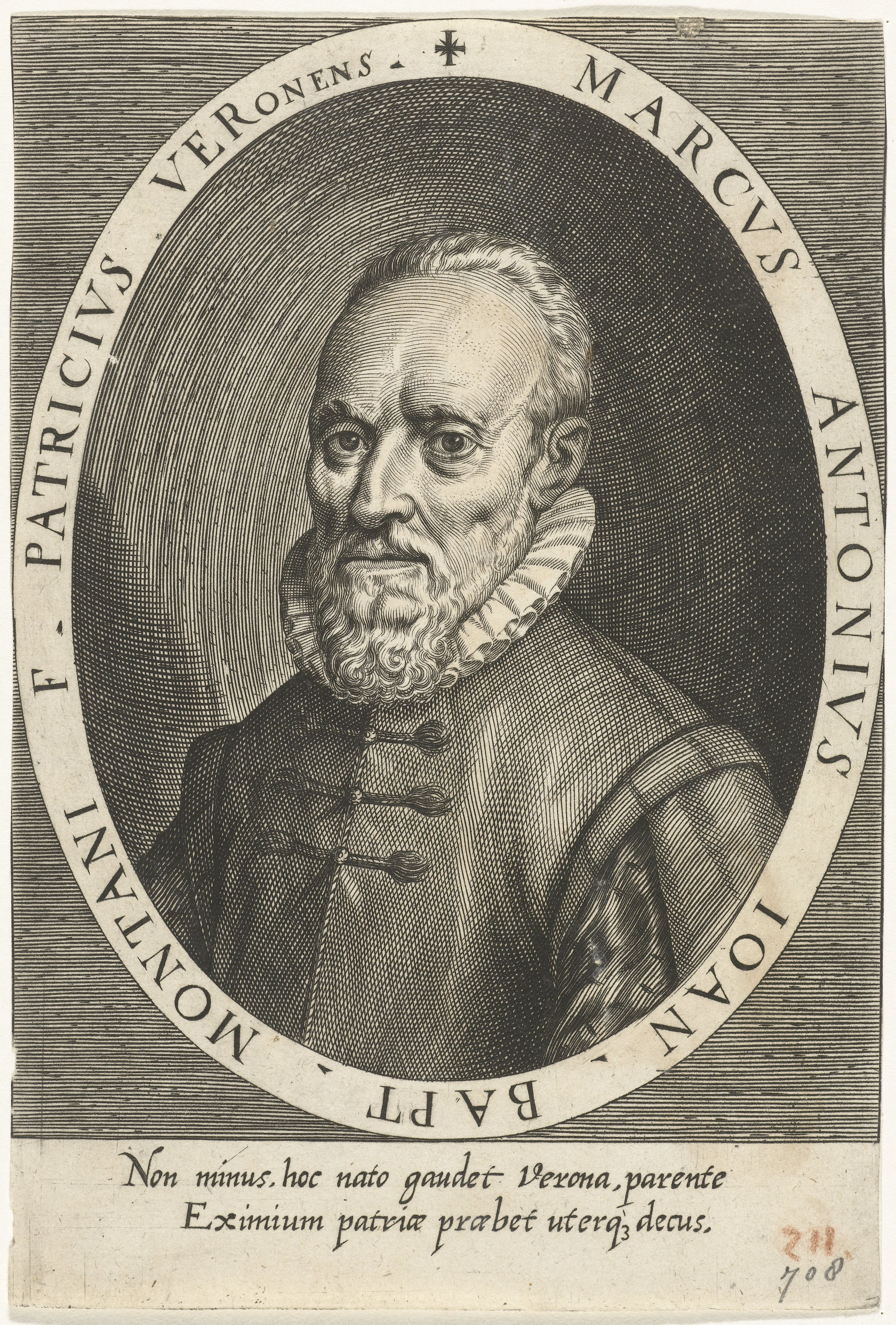 IdentificatieTitel(s): Portret van Marcus Antonius Gian Baptista MontanusObjecttype: prent Objectnummer: RP-P-1909-4411Opschriften / Merken: verzamelaarsmerk, verso, gestempeld: Lugt 2228VervaardigingVervaardiger: prentmaker: Dominicus CustosPlaats vervaardiging: AugsburgDatering: 1579 - 1615Fysieke kenmerken: gravureMateriaal: papier Techniek: graveren (drukprocedé)Afmetingen: blad: h 175 mm × b 118 mmOnderwerpWie: Marcus Antonius Gian Baptista MontanusVerwerving en rechtenVerwerving: aankoop 1905Copyright: Publiek domein